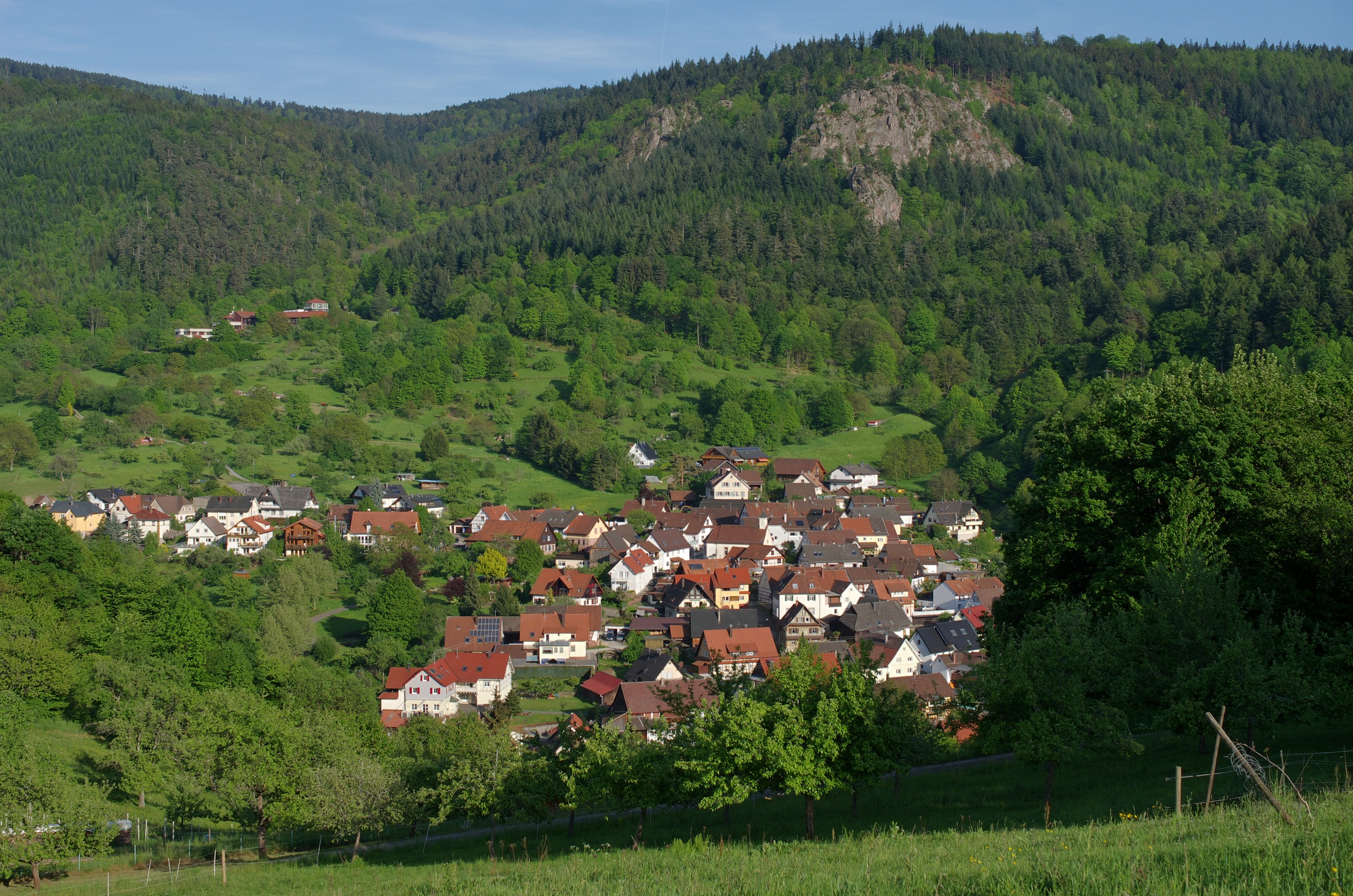 Der Gernsbacher Stadtteil Lautenbach, darüber die Lautenfelsen im gleichnamigen Naturschutzgebiet. Der Ort ist Umgeben vom Landschaftsschutzgebiet Mittleres Murgtal.